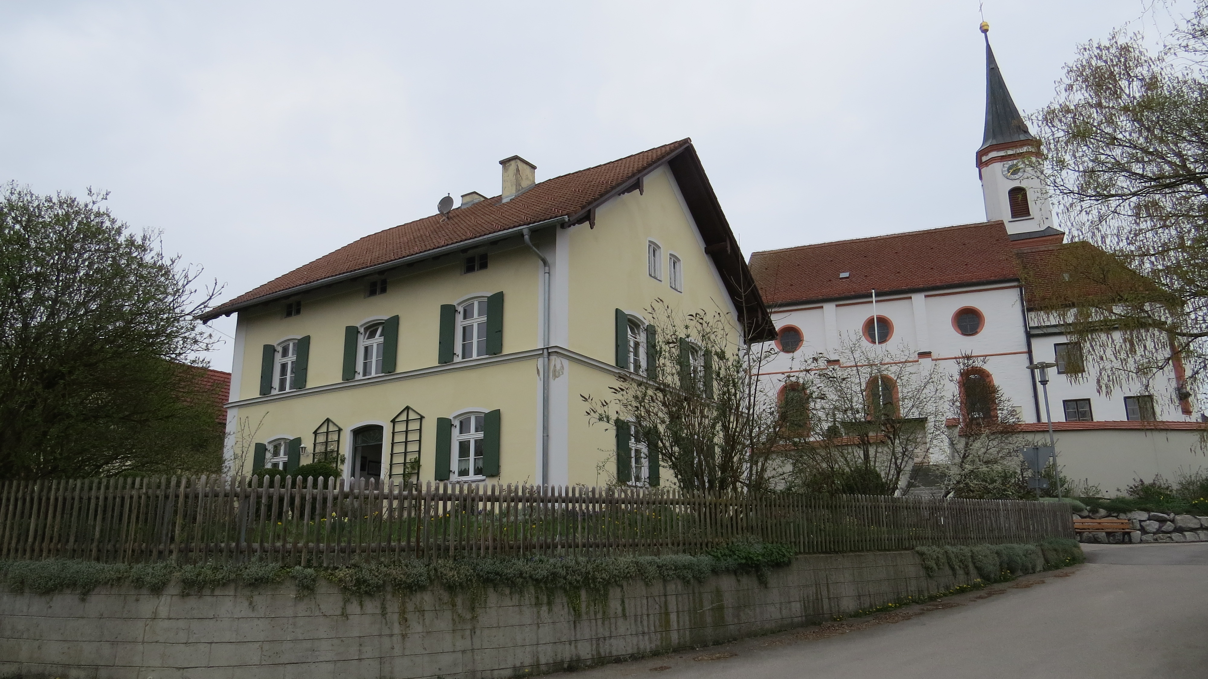 Pfarrhof in Ludenhausen, Reichling